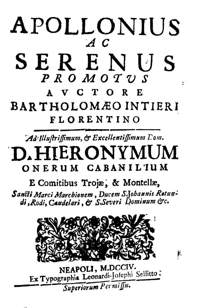 Apollonius ac Serenus promotus auctore Bartolomaeo Intieri Florentino. Ad illustrissimum, & excellentissimum Dom. D. Hieronymum Onerum Cabanilium .... - Neapoli : ex typographia Leonardi Josephi Sellito, 1704. - [8], 70, [2] p., [1] c. di tav. ripiegate : ill. ; 4º .